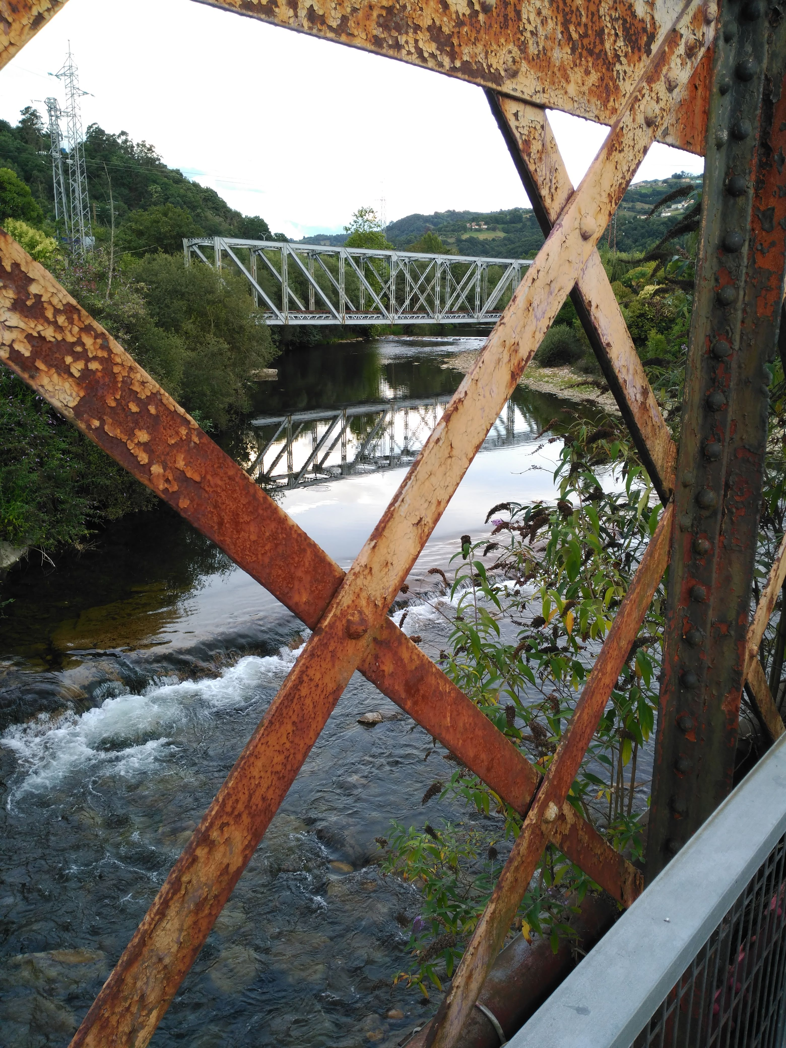 Puente de Los Ingleses desde el puente de La Maquinilla, en Sama de Langreo, Asturias